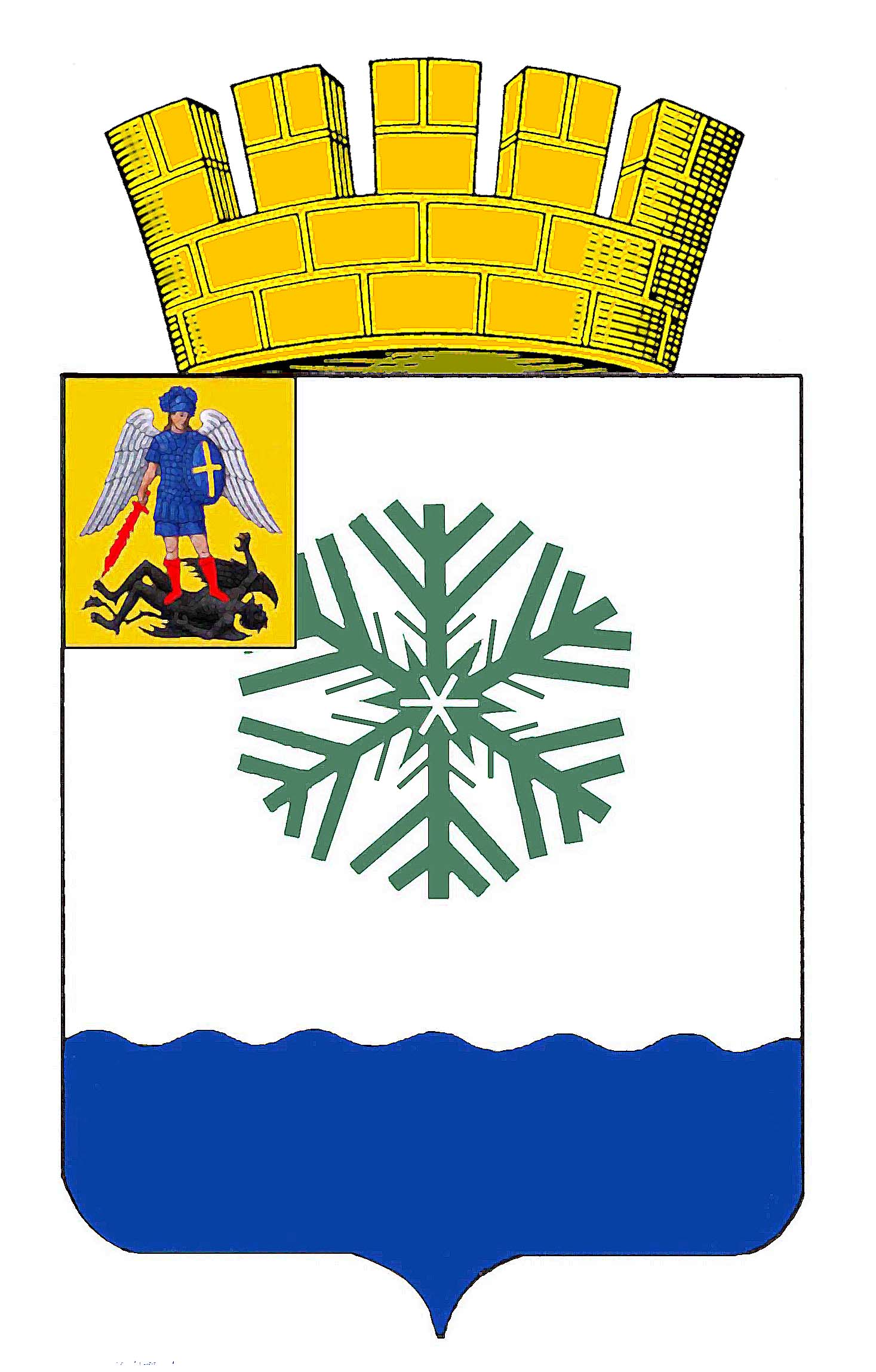 Новый герб города Новодвинска утверждён 22 февраля 2007 года Описание герба: "В серебряном поле с волнистой лазоревой оконечностью зелёная снежинка о шести длинных подобных еловым ветвям лучах, перемежающихся шестью же короткими заострёнными лучами. В вольной части - герб Архангельской области. Щит увенчан [золотой башенной короной о пяти видимых зубцах] муниципальной короной установленного образца" Автор герба: О.Алиев (Свириденко), г. Вологда.